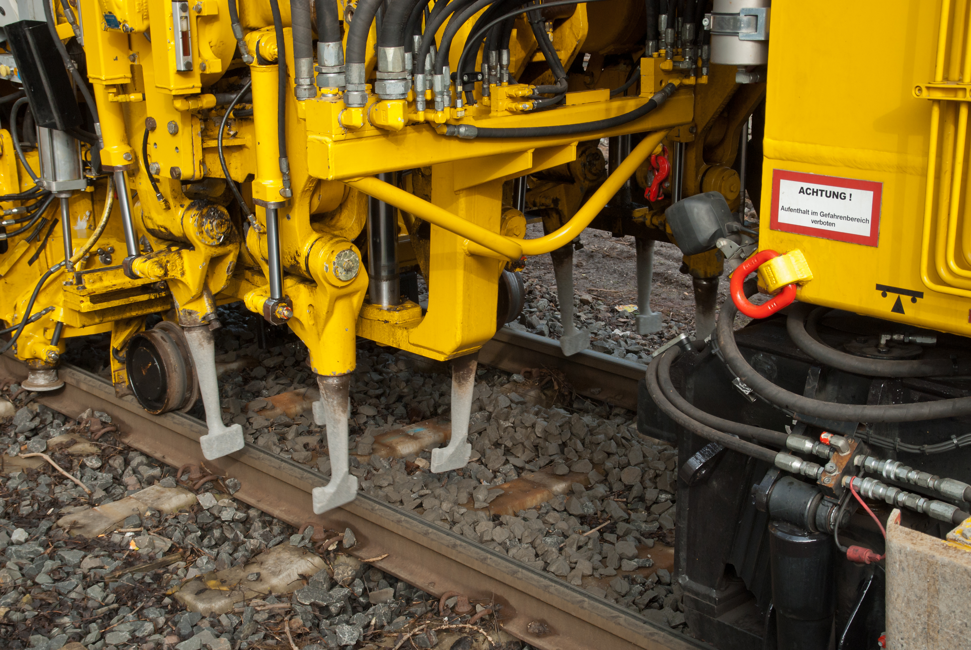 Plasser und Theurer Plassermatic 08-275/4 ZW-Y Gleisstopfmaschine, in Aktion auf der Wurmtalbahn im Bereich des Bahnhofes Oberbruch